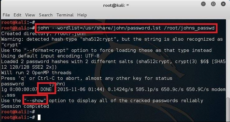 Монгол: Команд